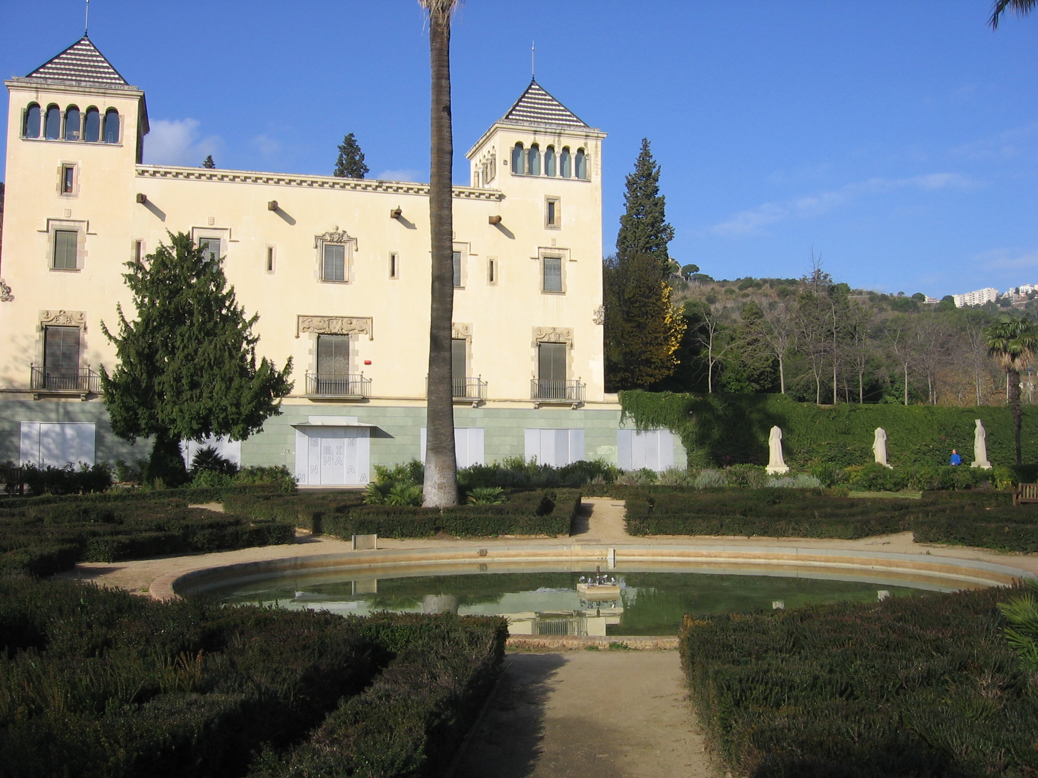 Jardines de Can Sentmenat.